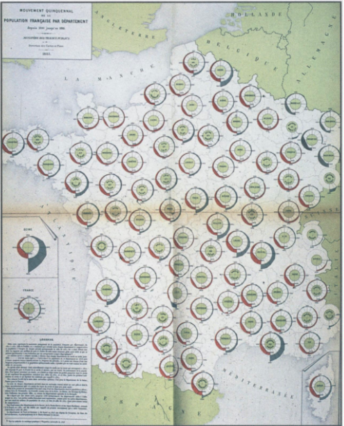 Mouvement quinquennial de la population par département depuis 1801 jusqu'en 1881 publiée par Émile Cheysson dans Album de statistique graphique, 1884.